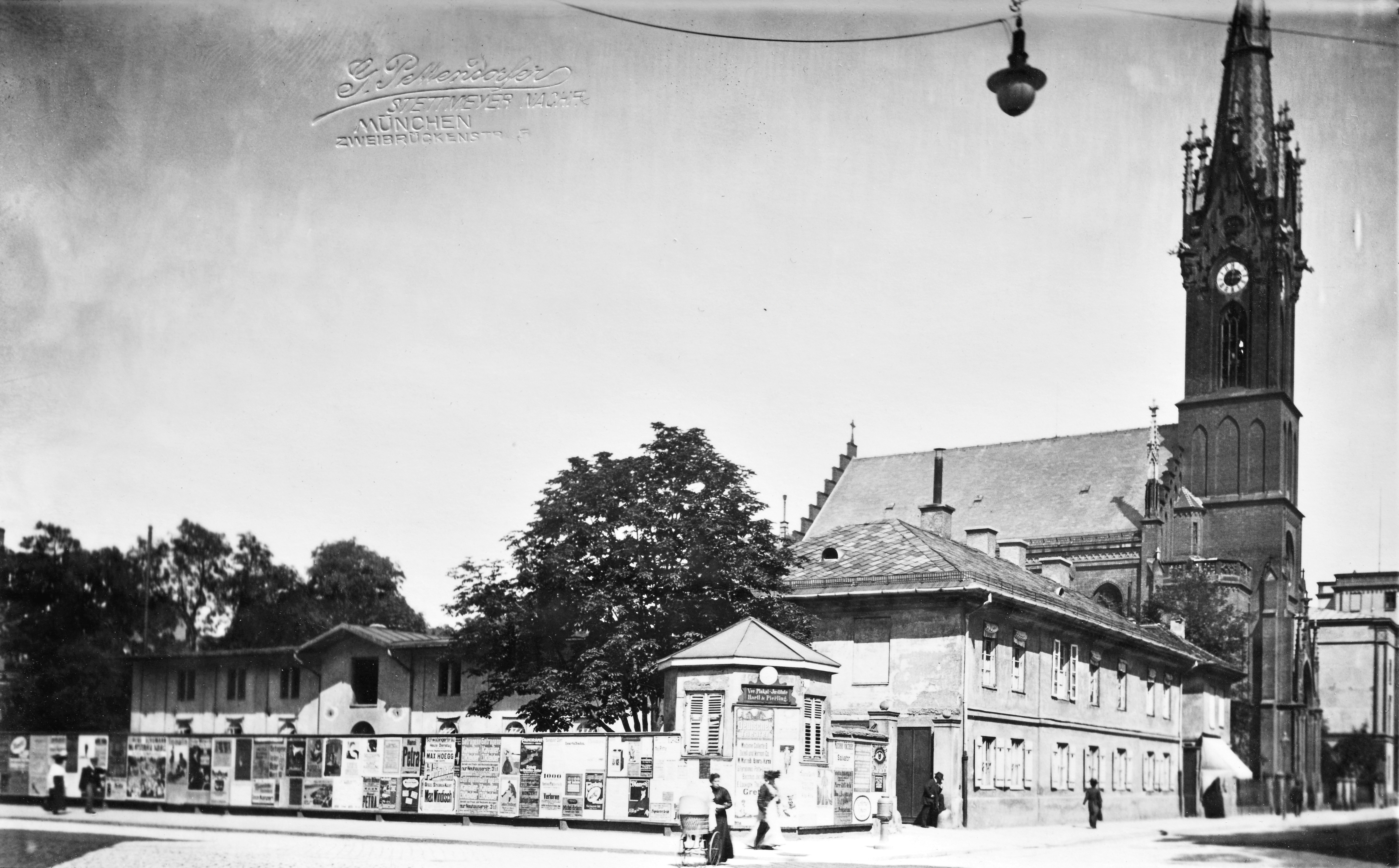 München. Mit dem Grundstück und der damals dort ansässigen Reitschule Fränkl auf Türkenstraße 16 mit der ecke Gabelsbergerstraße Hausnummern 6, 8, 10. Im Hintergrund die Markuskirche.